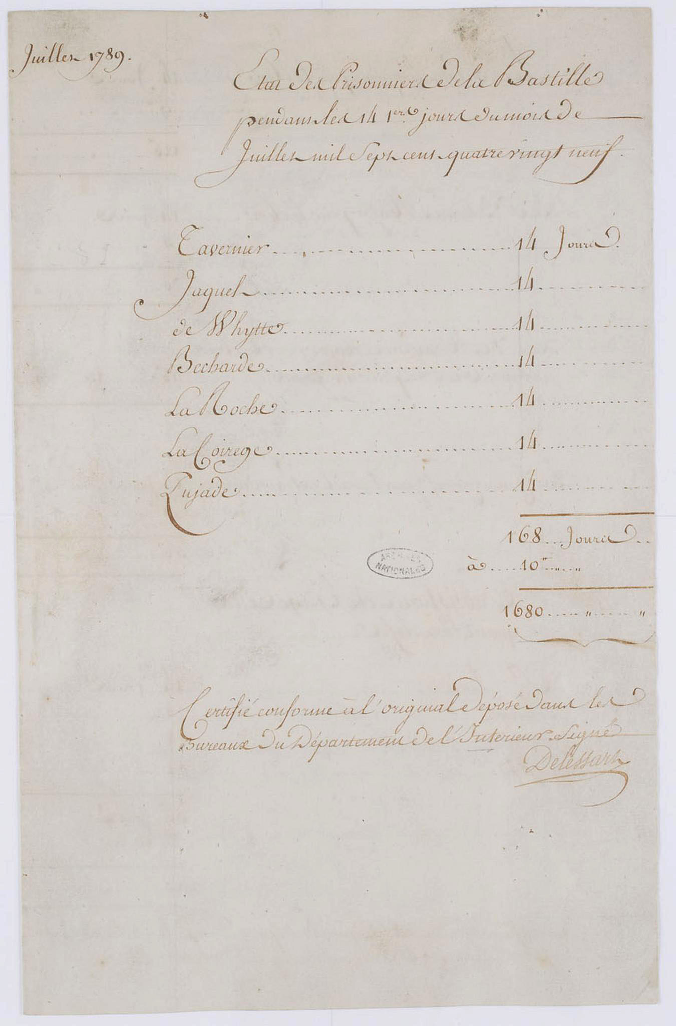 Copie d'un état des prisonniers de la Bastille entre le 1er et 14 juillet 1789 avec l'indication des sommes dépensées pour leur incarcération, établie en 1791 et certifiée conforme par Delessart, ministre de l'intérieur (première page)